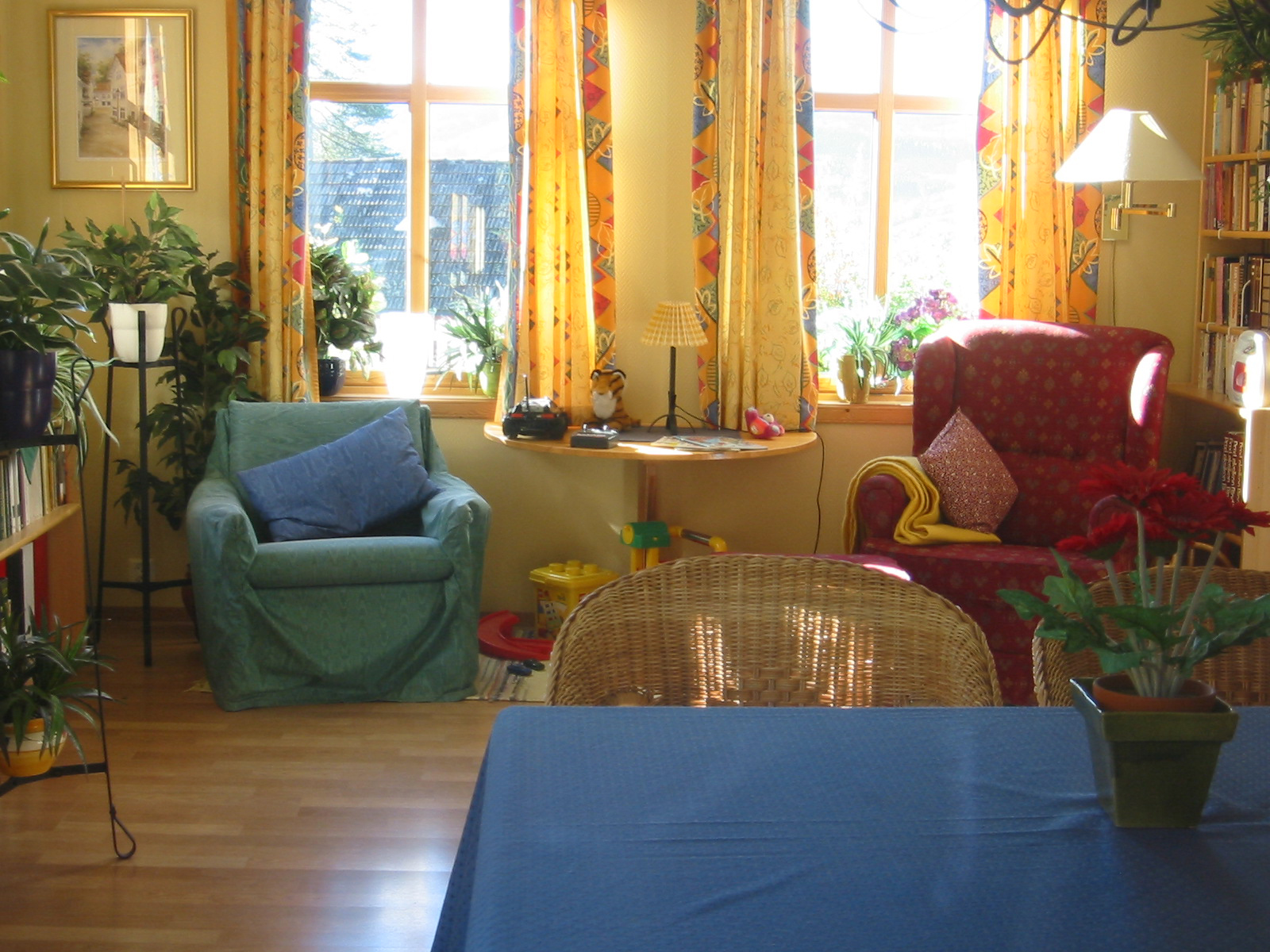 «90-tallet», Maihaugen, Lillehammer